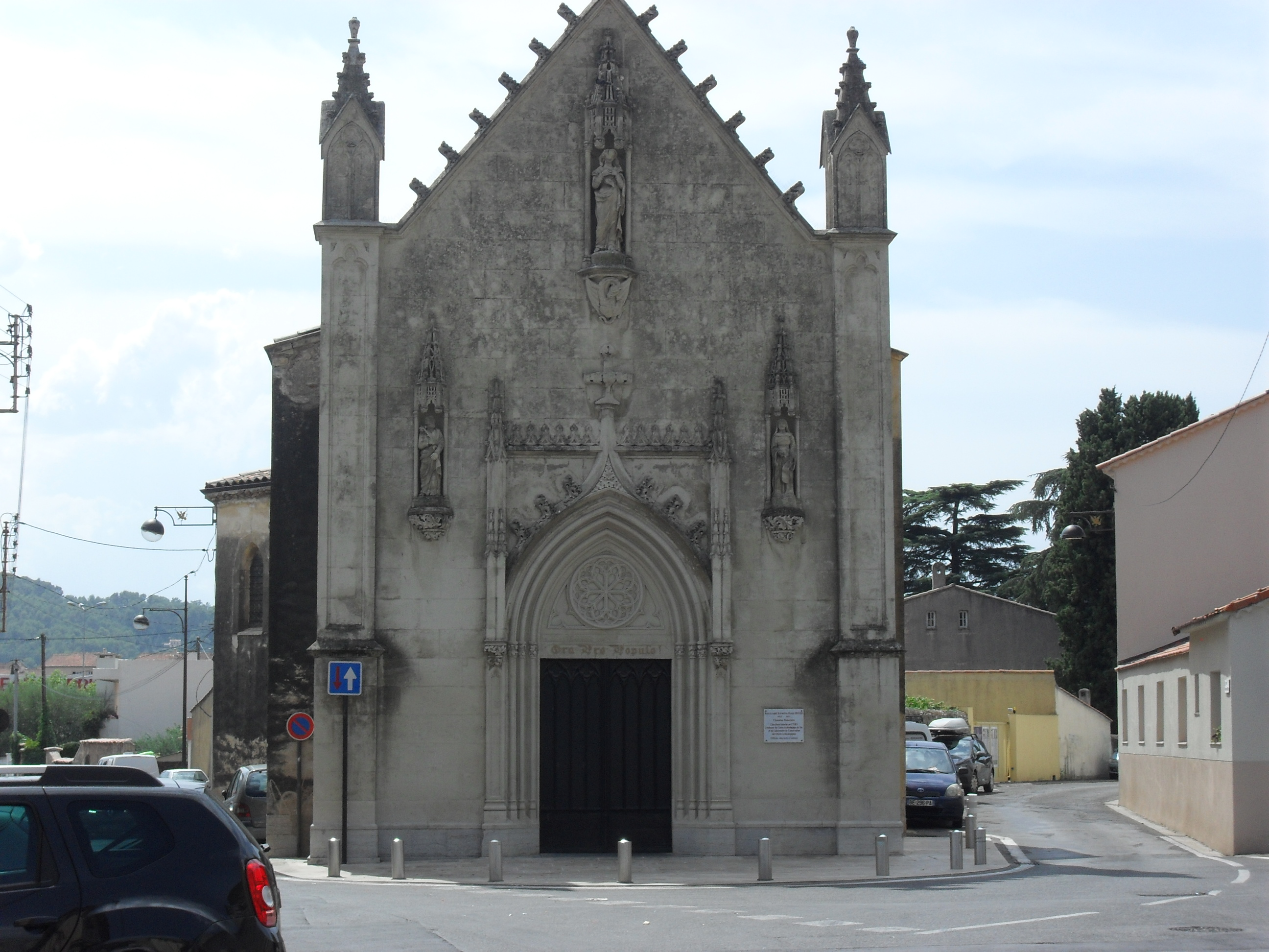 Devant de l'église Notre-Dame-du-Peuple de Draguignan.